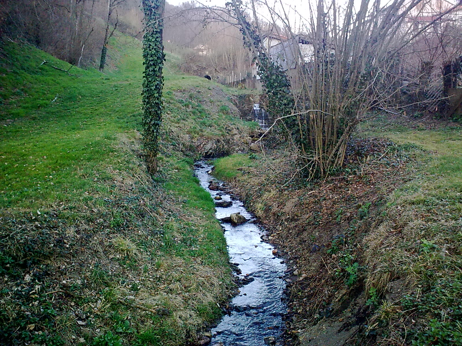 L'Enne, qui traverse Cransac